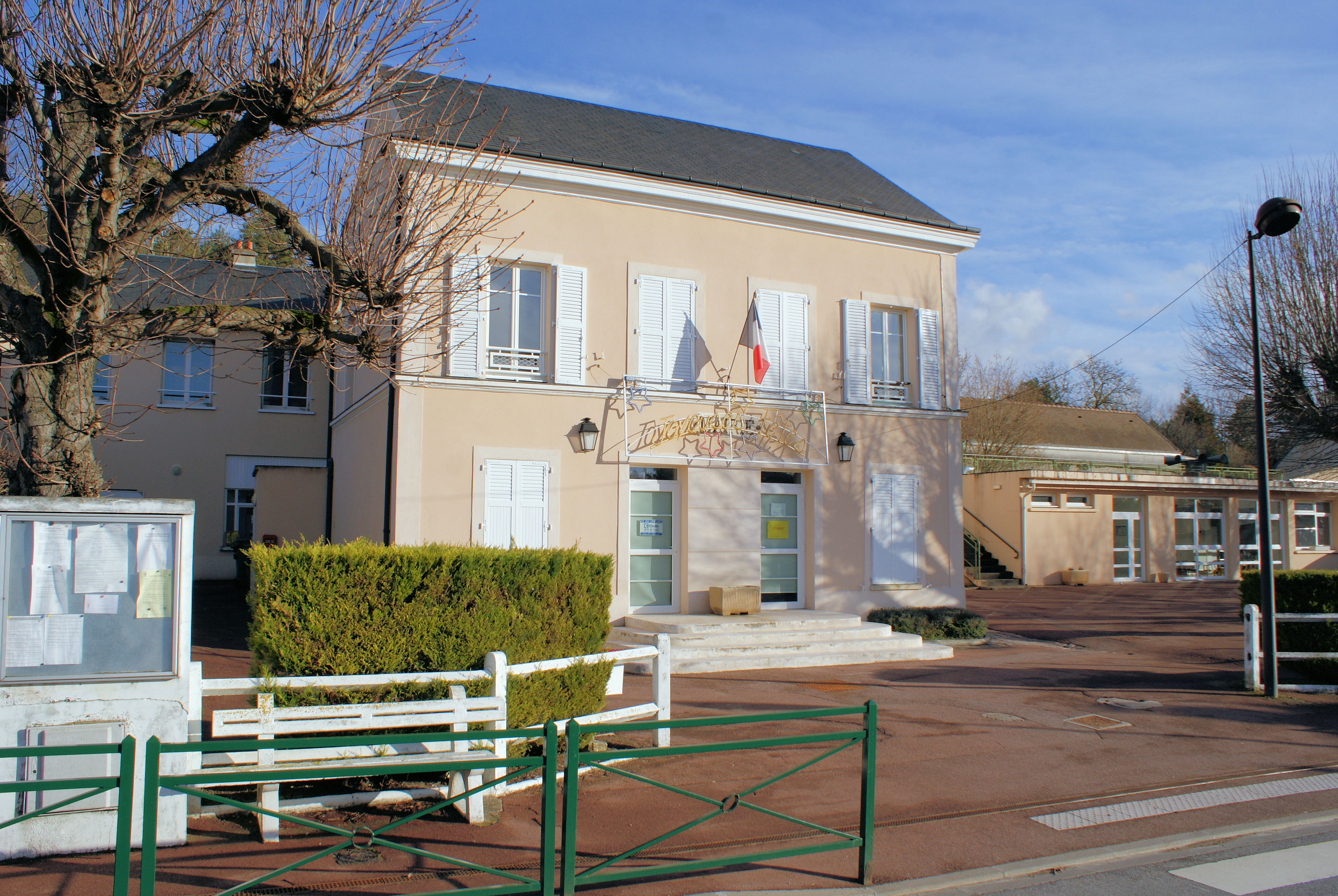 Vue de la mairie d'Ormoy-la-rivière (Essonne, FRANCE)